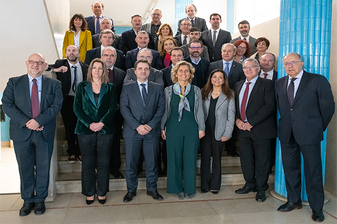 Foto de familia tras la asamblea general de Matosinhos de 2020.